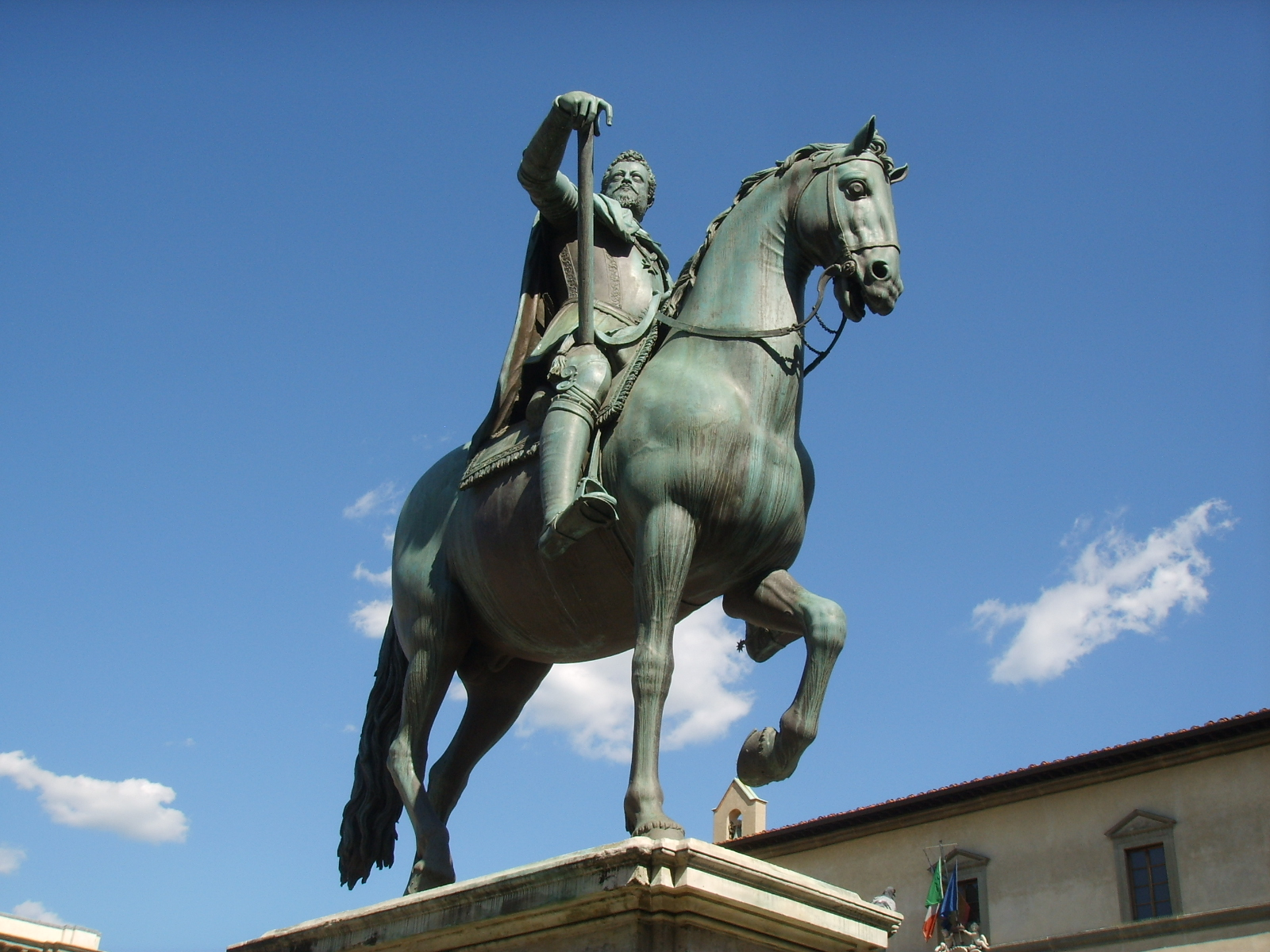 Monumento equestre a ferdinando I